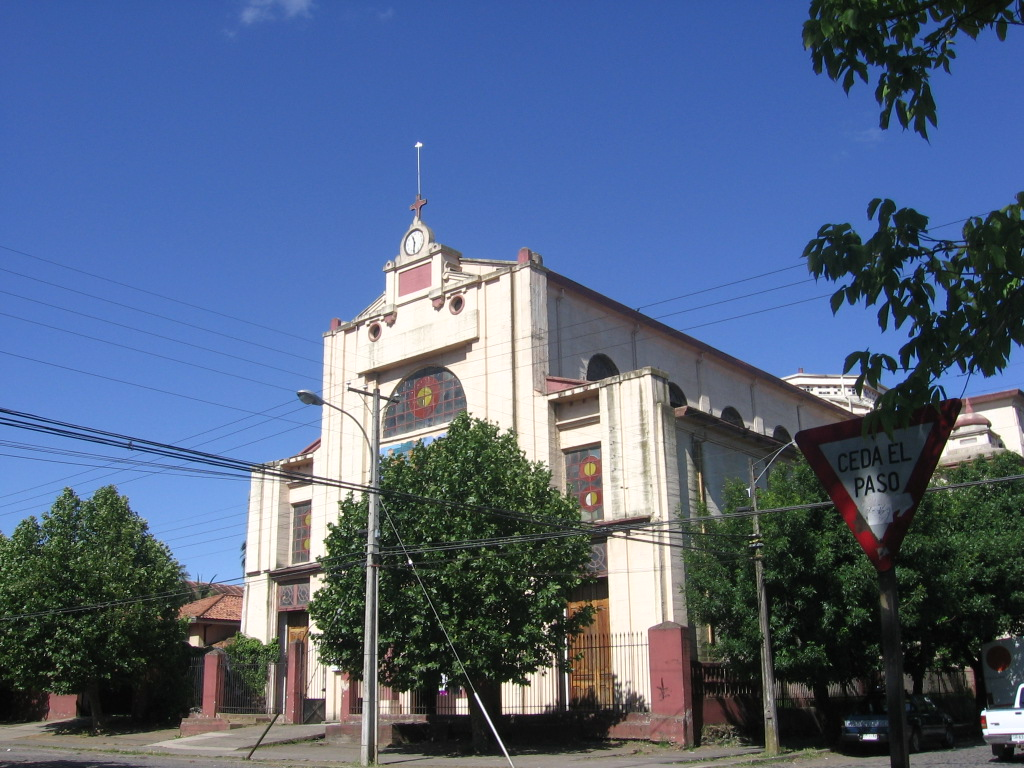 Parroquia San Francisco Chillan